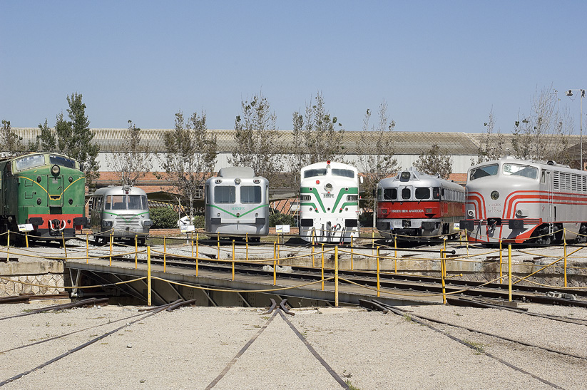 Museu del Ferrocarril - rotonda